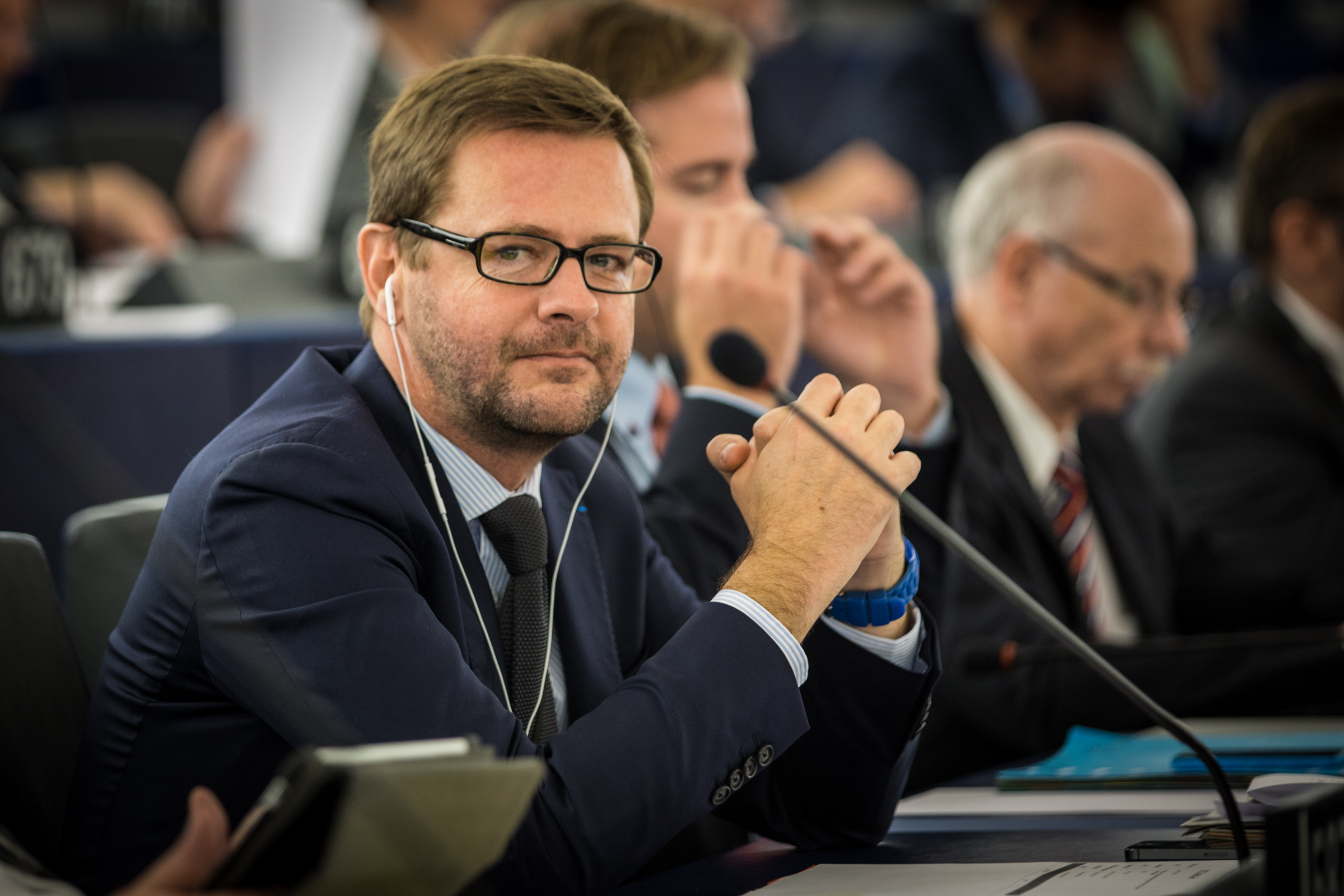 Jérôme Lavrilleux Parlement européen 26 novembre 2014